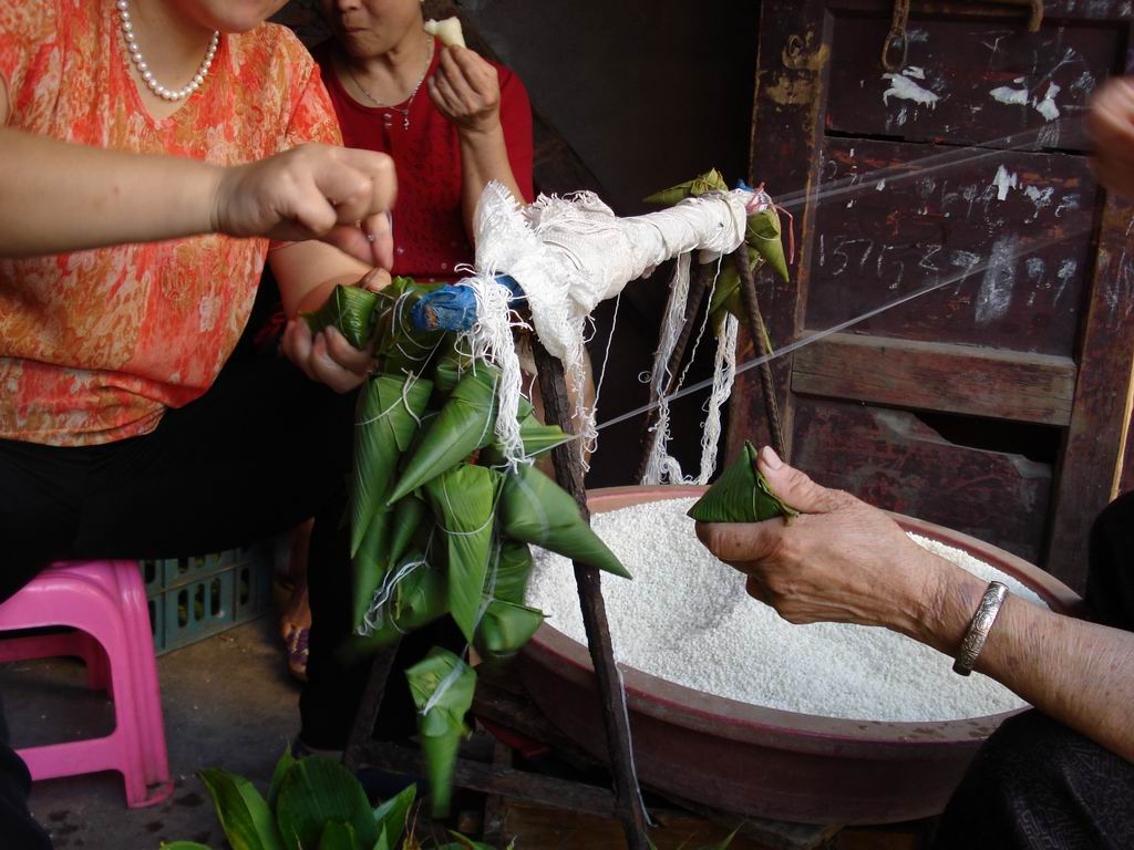 包粽子